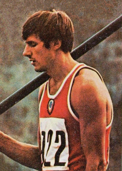 CAMPIONI dello SPORT 1973/74-Figurina n.12- AVILOV - URSS -ATL.LEGGERA